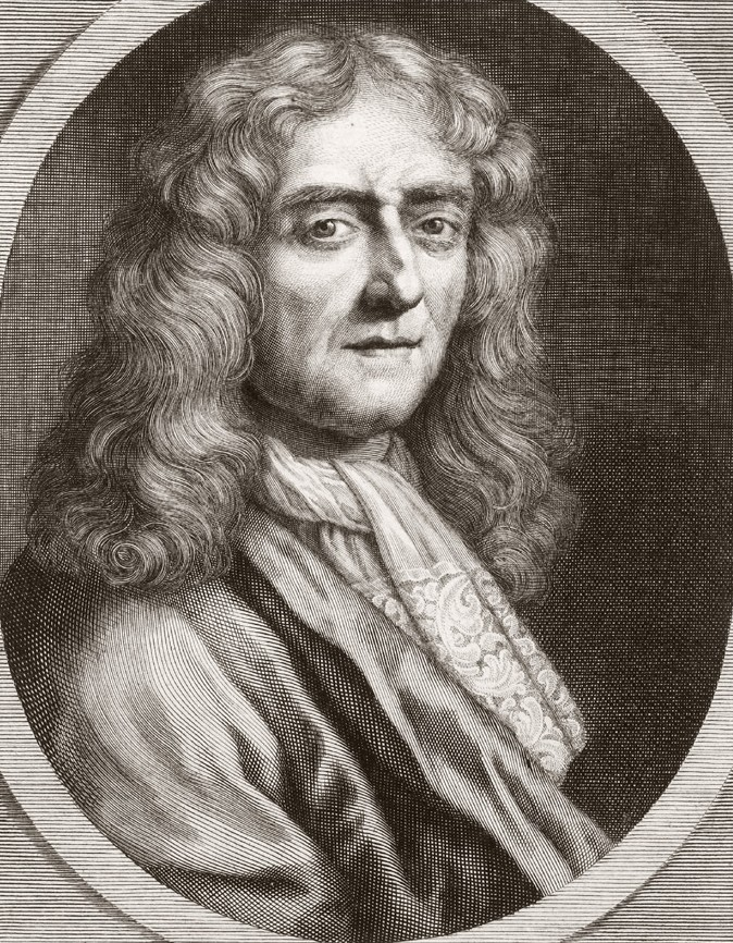 Jean Desmarets de Saint-Sorlin (1596-1676)